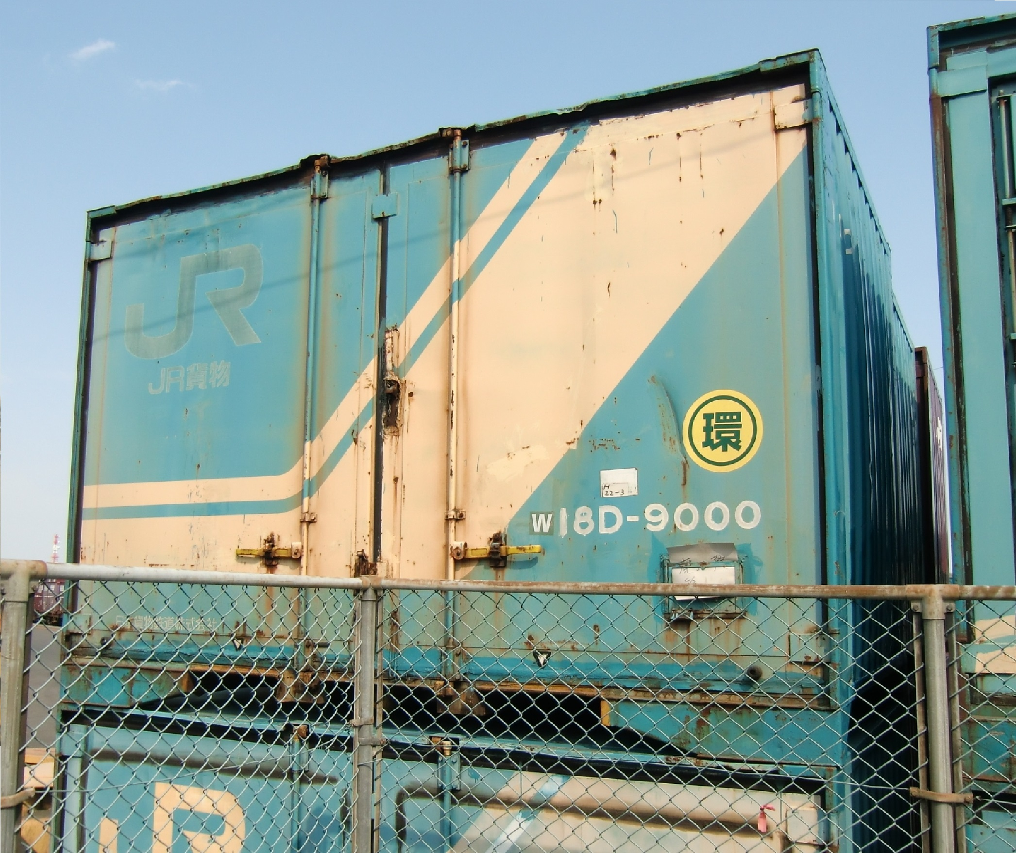 撮影地＝【宮城／旧、宮城野貨物駅】